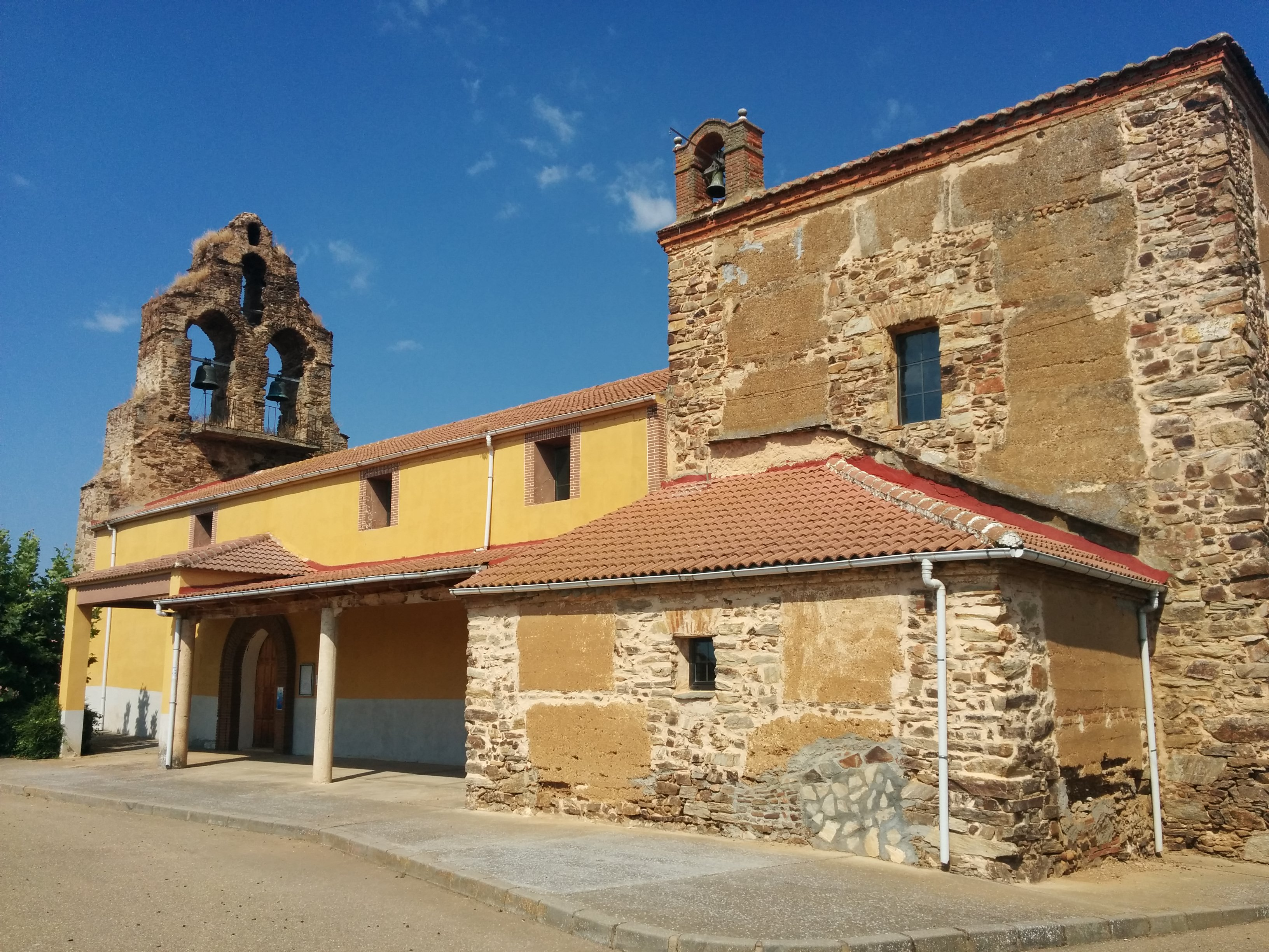 vista lateral de la Iglesia de Roperuelos del Páramo